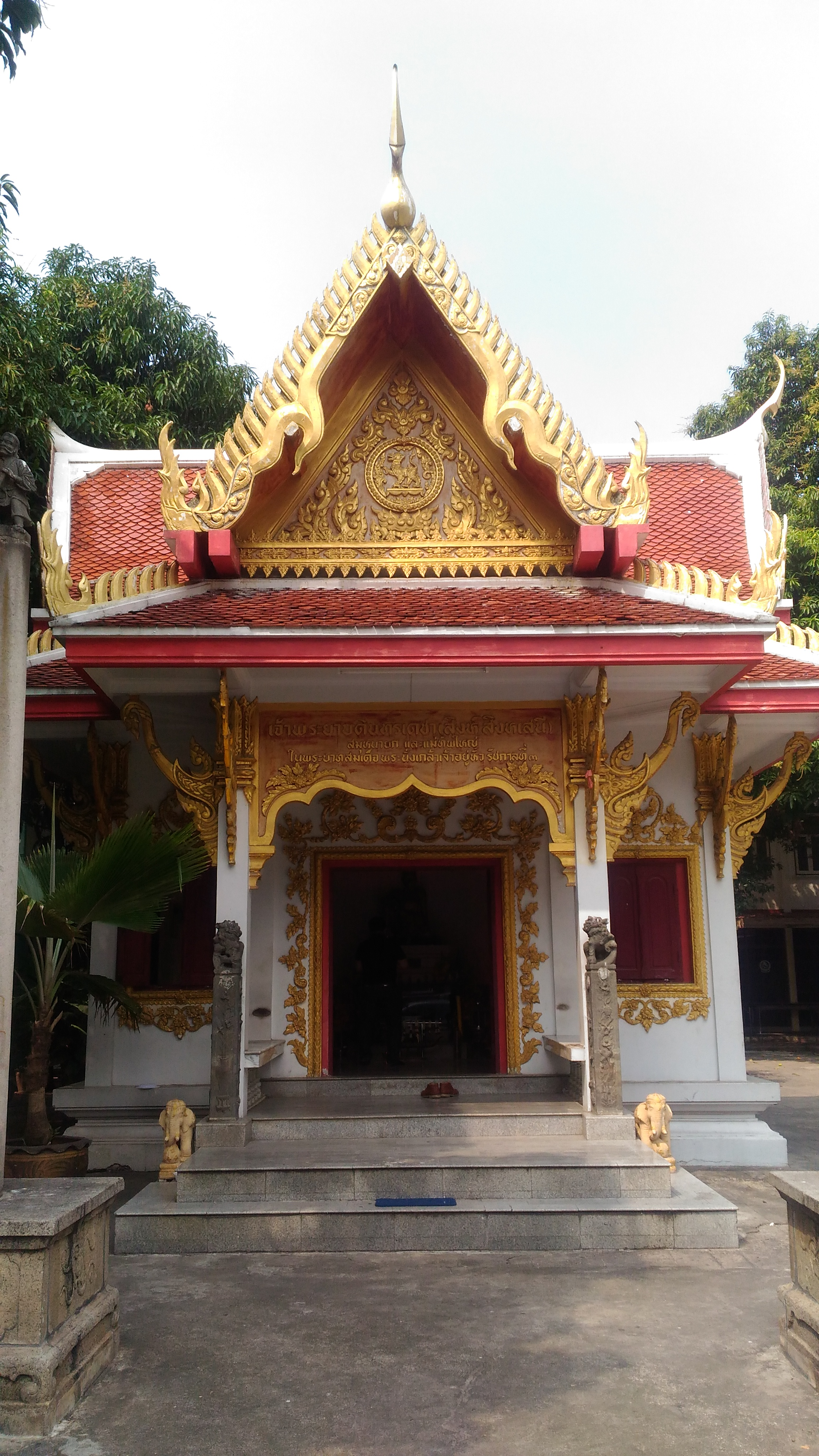 ศาลเจ้าพระยาบดินทรเดชา (สิงห์ สิงหเสนี) สมุหนายกและแม่ทัพใหญ่ในพระบาทสมเด้จพระนั่งเกล้าเจ้าอยู่หัวรัชกาลที่ 3 ตั้งอยู่ในวัดจักรวรรดิราชาวาส แขวงจักรวรรดิ เขตสัมพันธวงศ์ กรุงเทพมหานคร